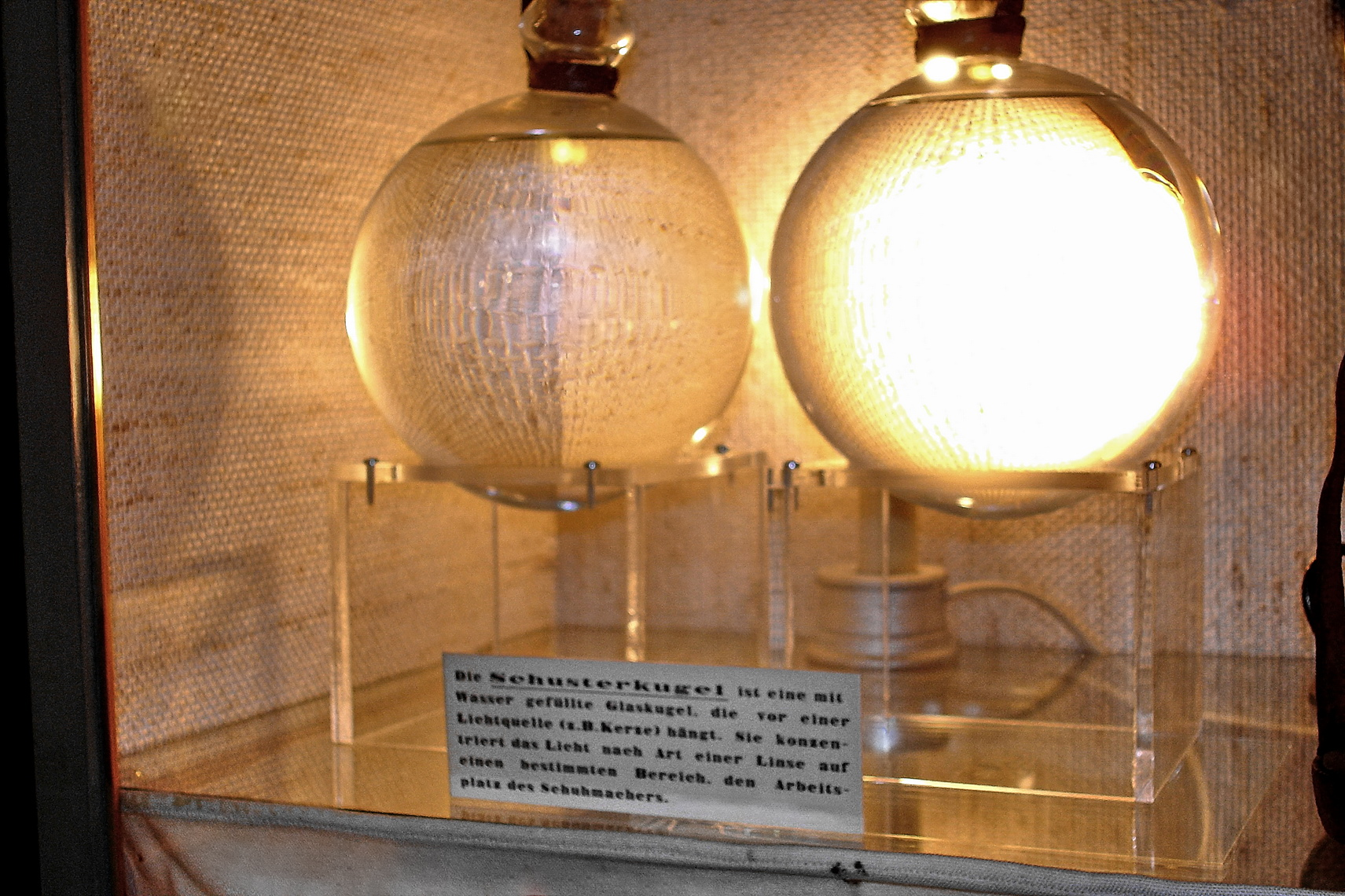 Schusterkugel - Arbeitslampe für Schuster